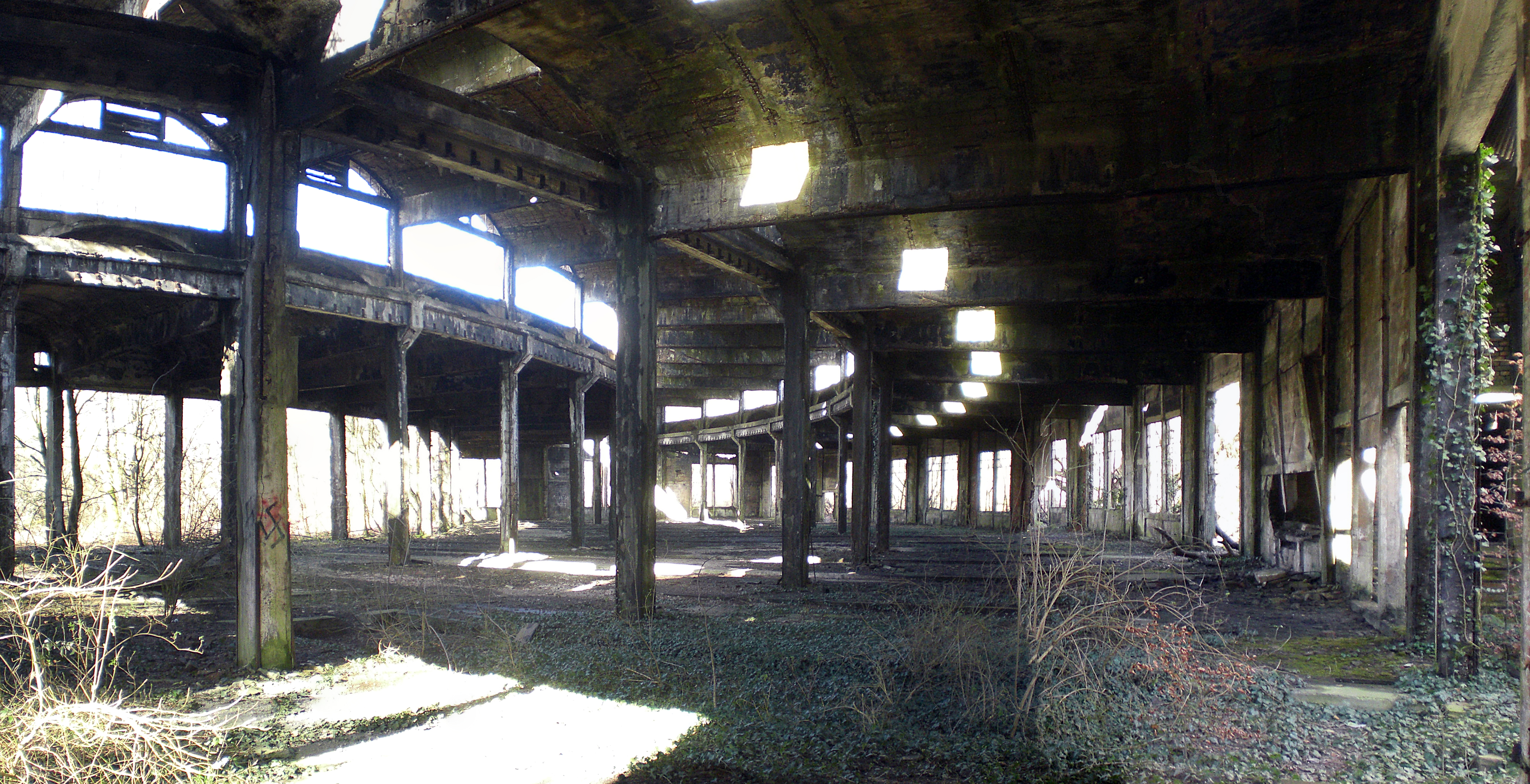 Bahndepot bei Benestroff. Grosser Lokschuppen. Heute ist das Gelände völlig renaturiert.